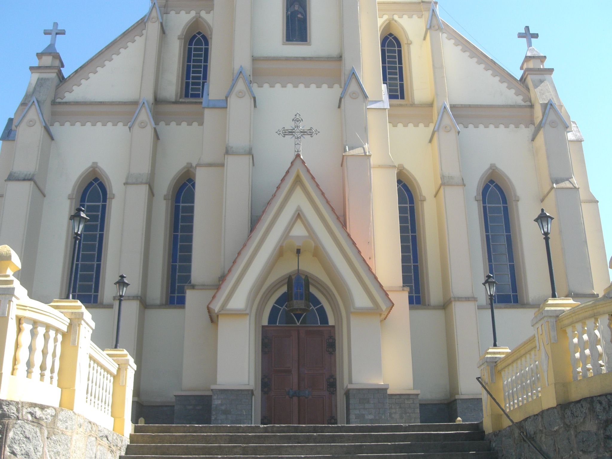 Igreja matriz (church/Kirche/église/chiesa) de Santo Amaro da Imperatriz